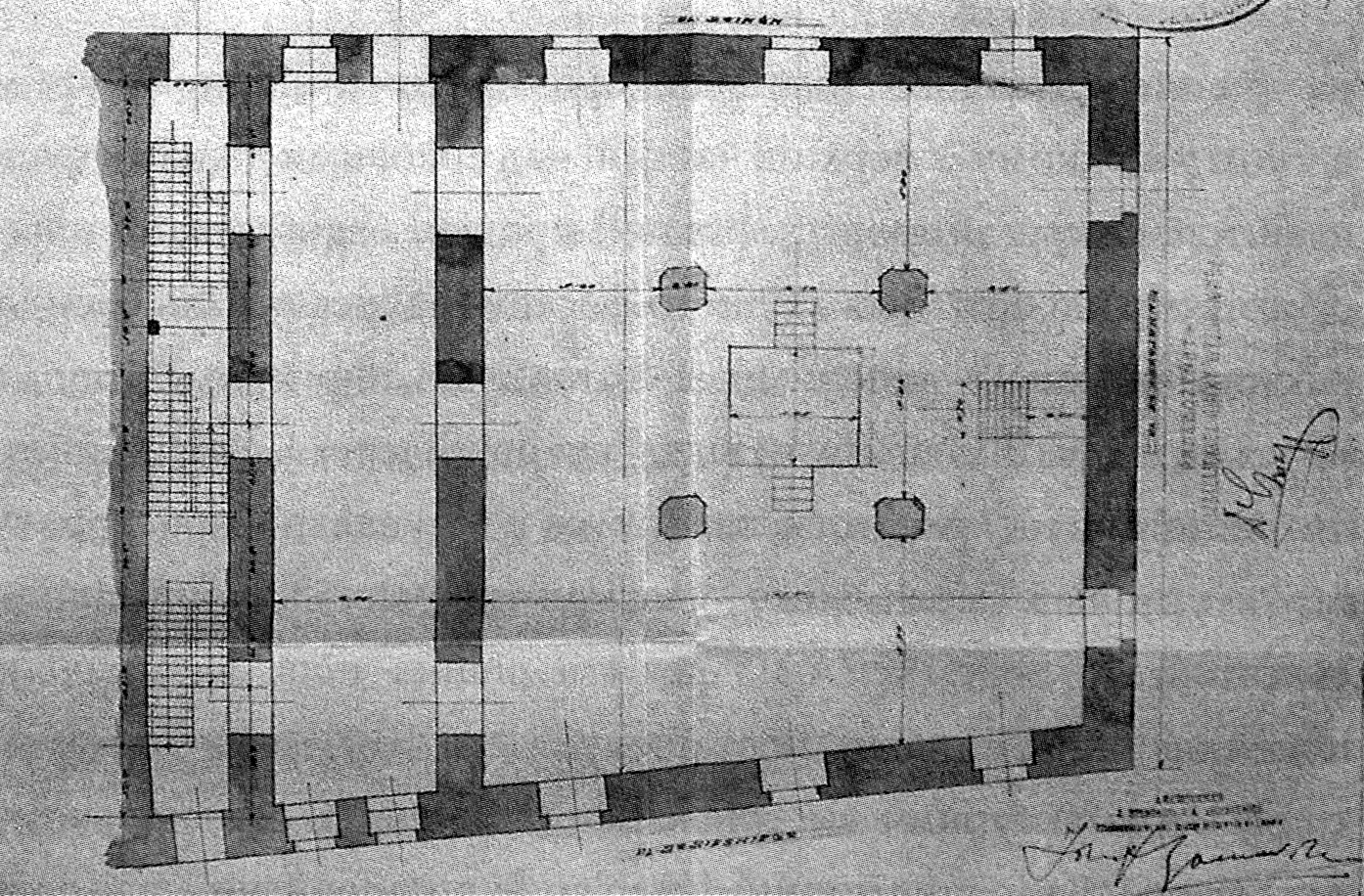 Проект реконструкції сходових маршів Великої міської синагоги у Львові. Архітектори Альфред Захаревич і Юзеф Сосновський.